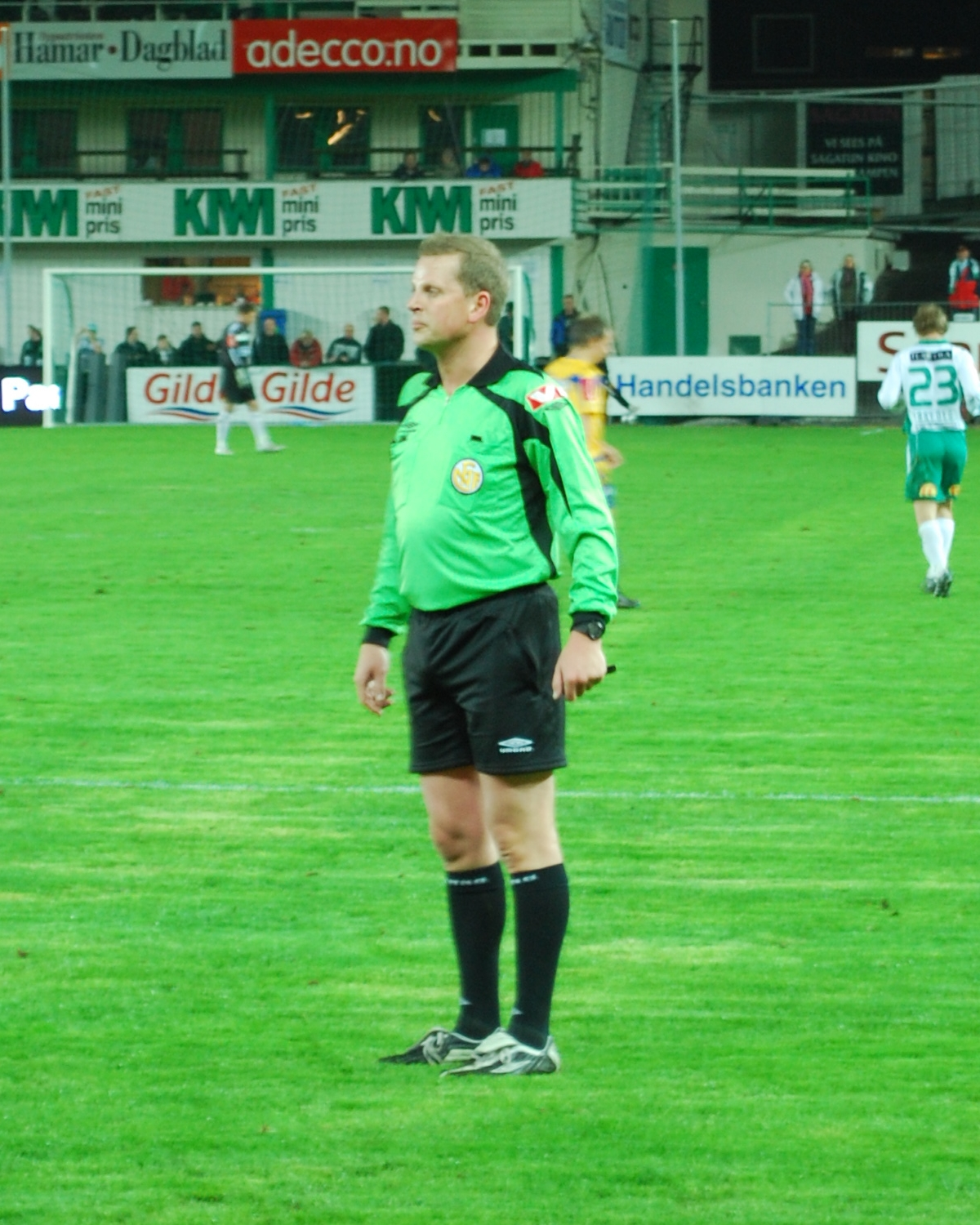 Trygve Kjensli, norsk fotballdommer i Adeccoligaen 2009.